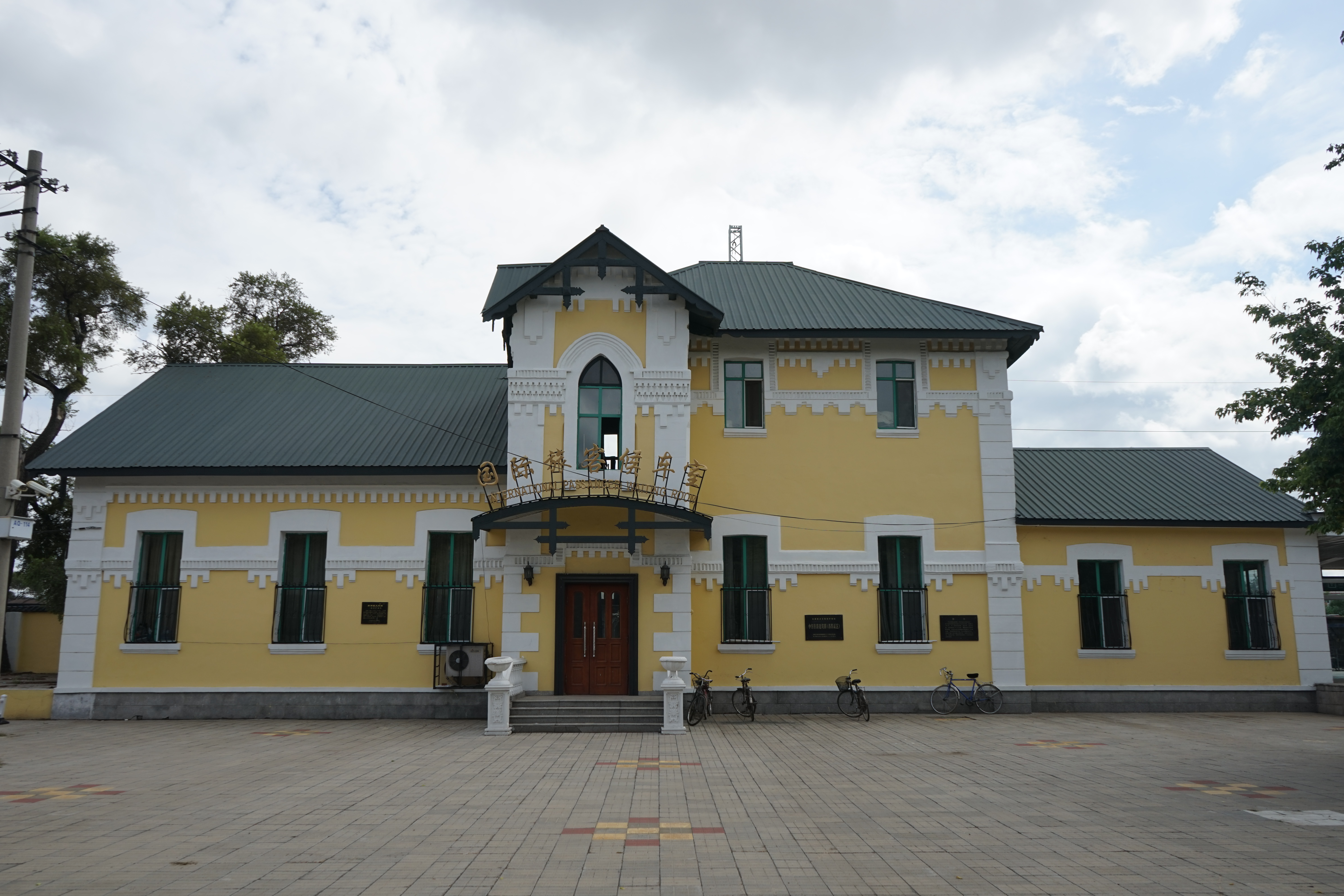 中东铁路建筑群 昂昂溪站